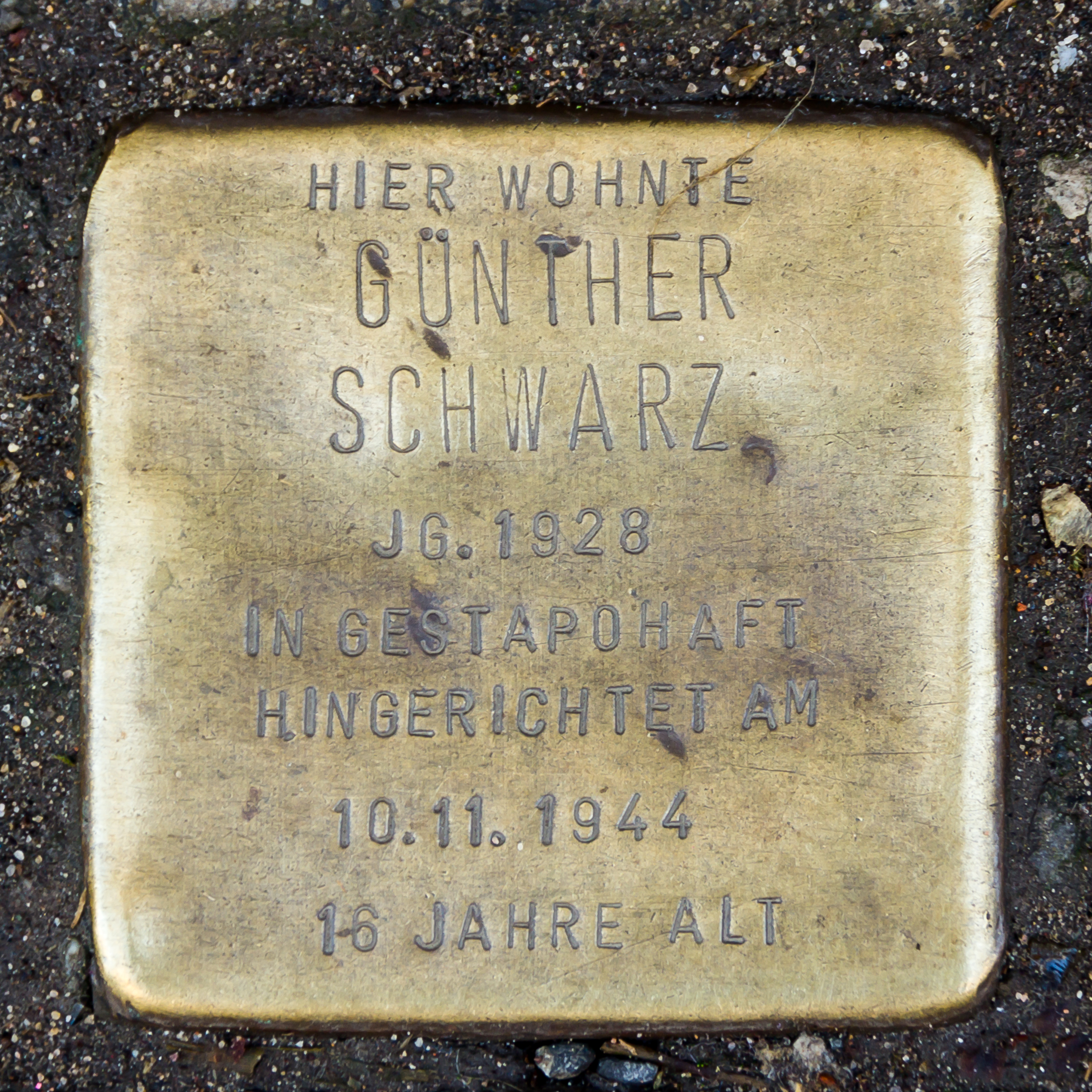 Stolperstein für Schwarz, Platenstraße 28, Köln Text: Hier wohnte Günther Schwarz Jg. 1928 In Gestapohaft hingerichtet am 10.11.1944 16 Jahre alt